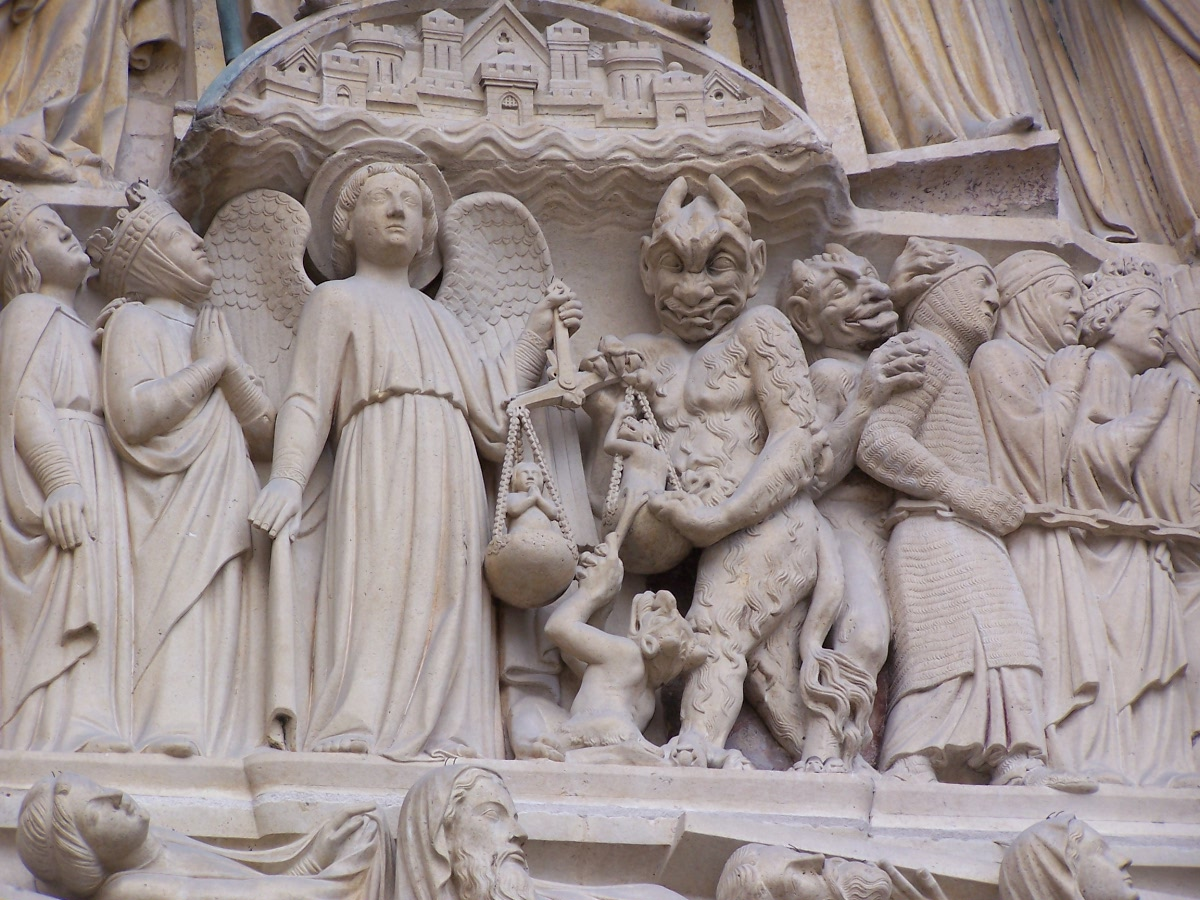 Всегда имей запас прочности.